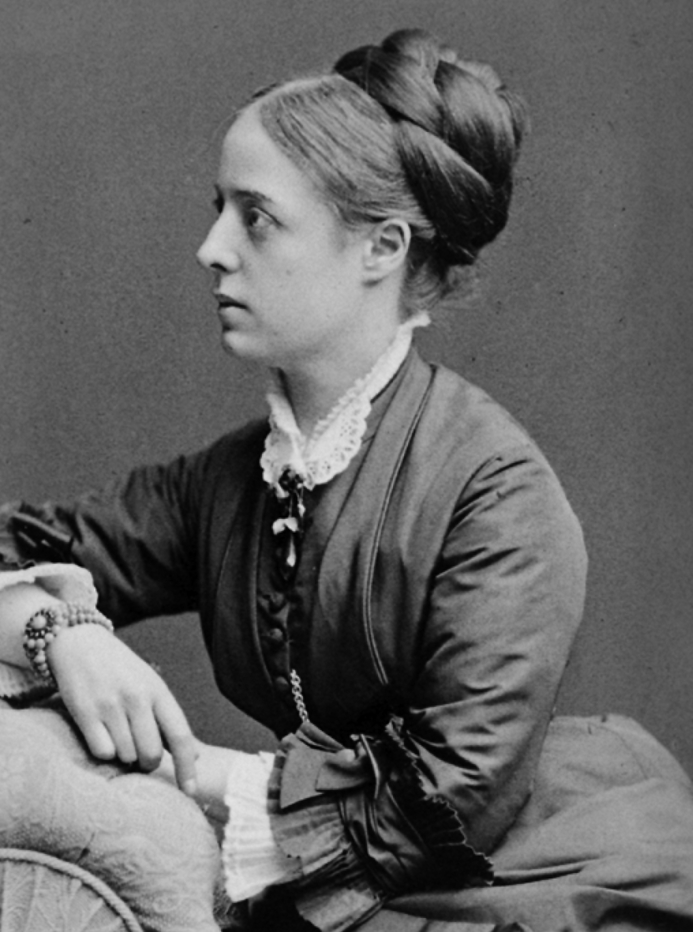 Gattin Georg von Vollmars, ca. 1890